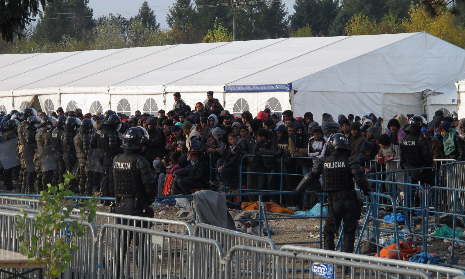 Ministrica za obrambo Andreja Katič je obiskala sprejemni center za migrante v Dobovi.